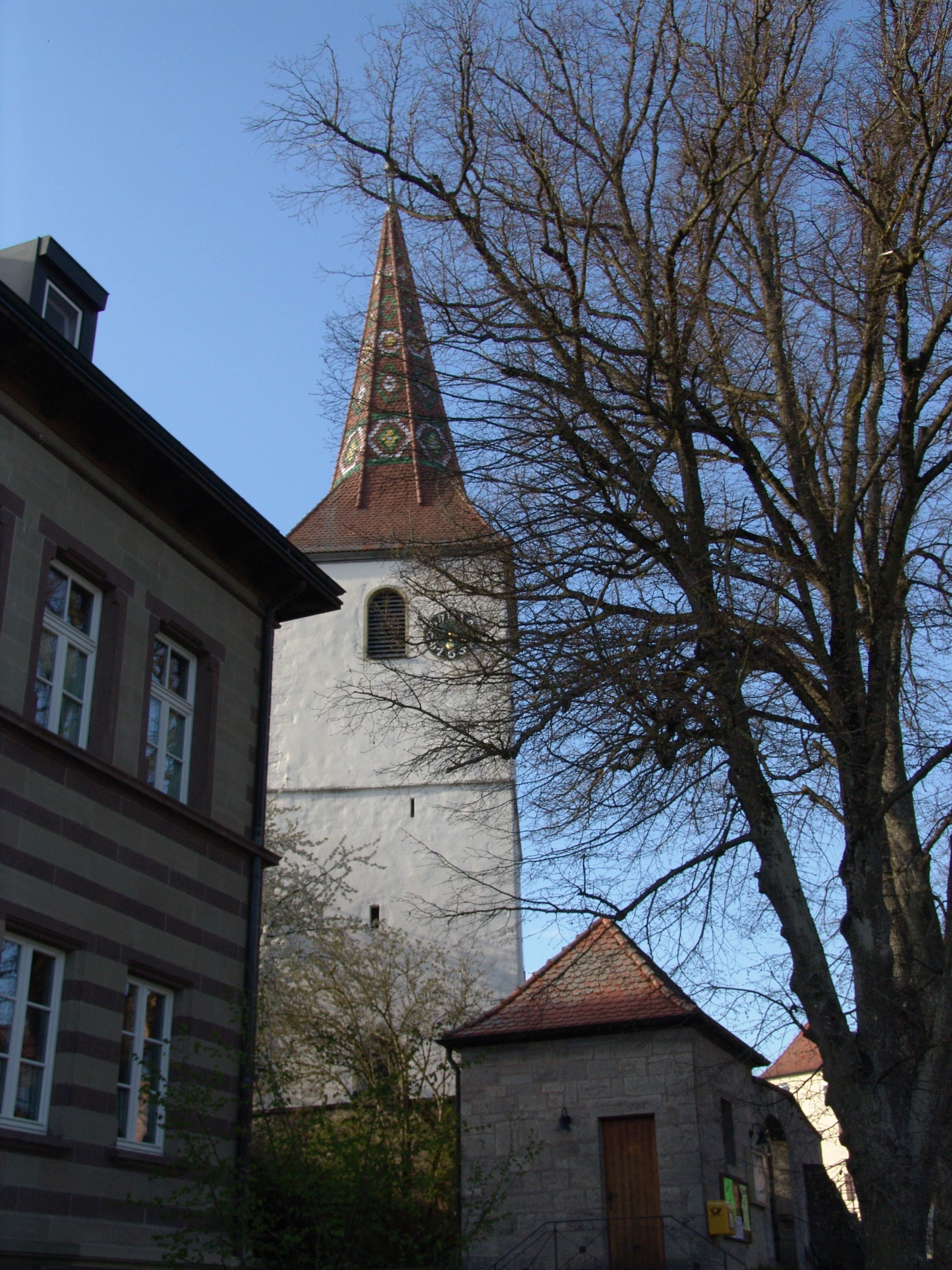 evang.-luth. Kirche St. Georg in Oberampfrach